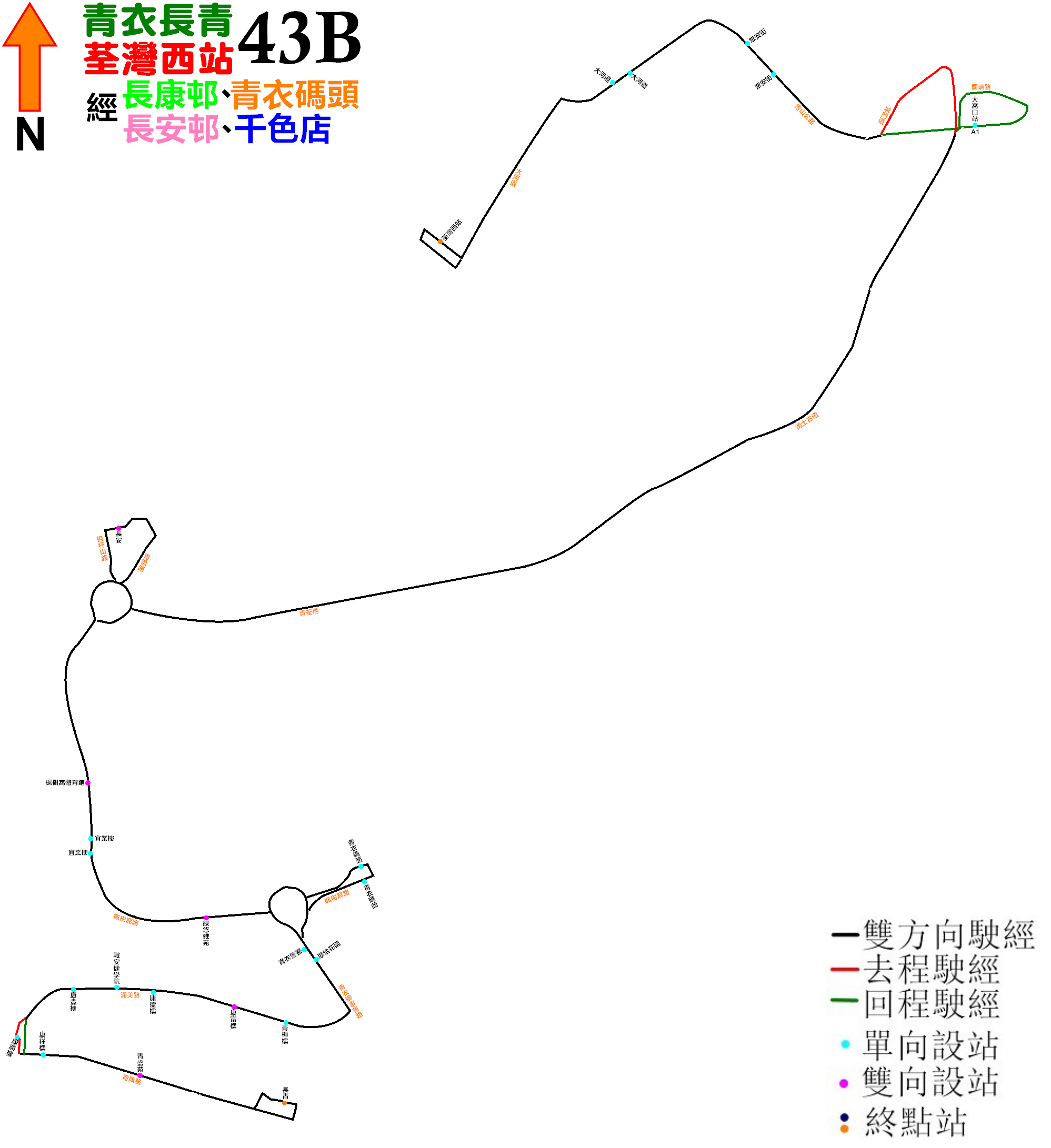 中文（香港）: 九巴43B線的走線圖